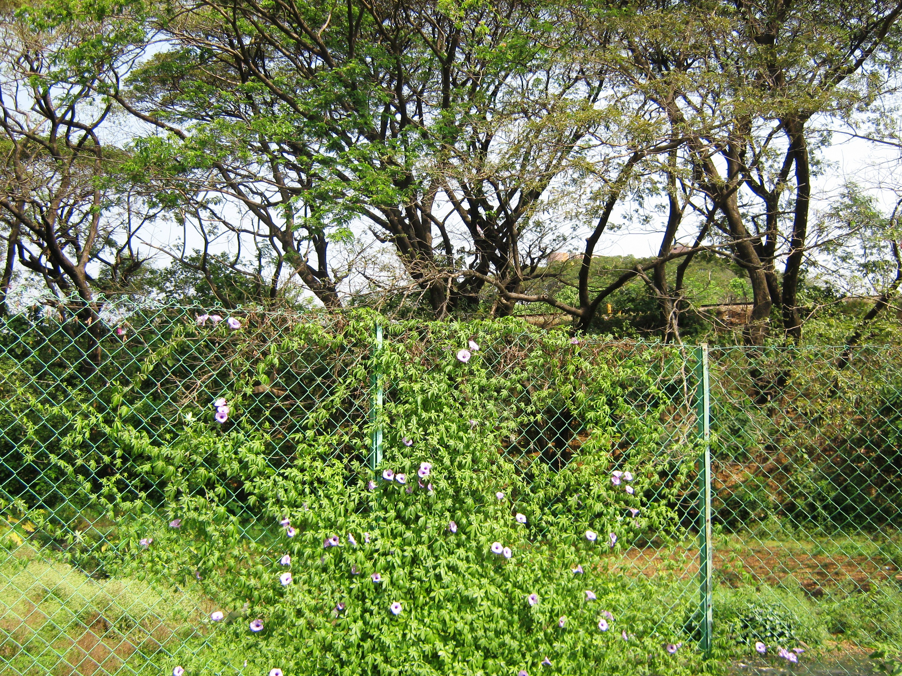 Kannur, Kerala, India.